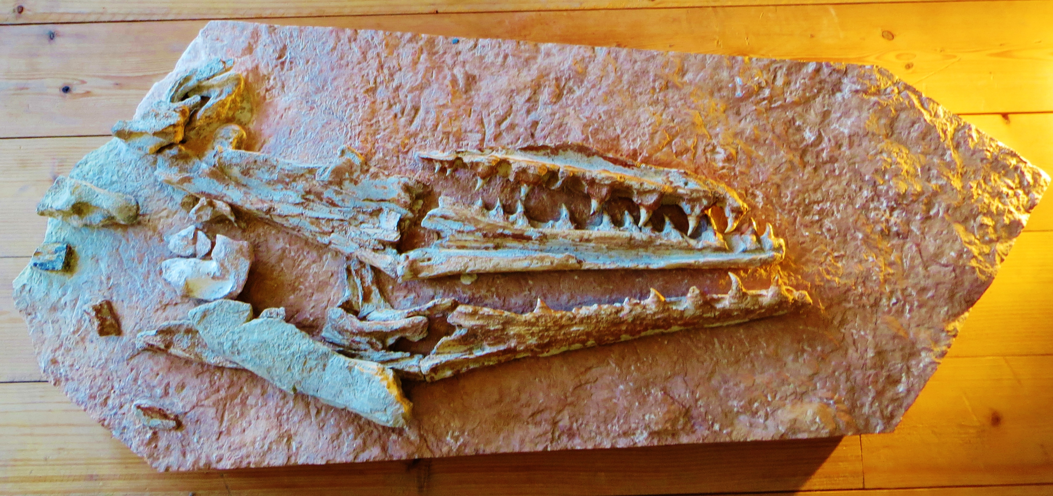 Fossil of Romeosaurus, an extinct reptile - Took the picture at Museo Paleontologico di Sant'Anna d'Alfaedo